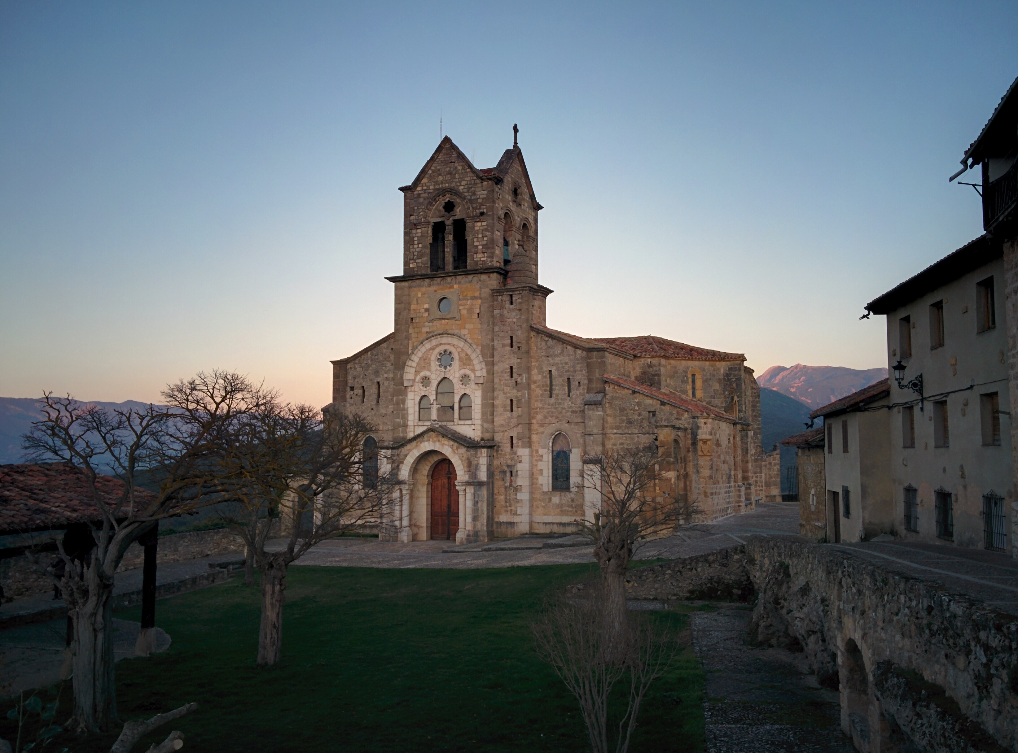 Iglesia de San Vicente, en Frías (Burgos, España).